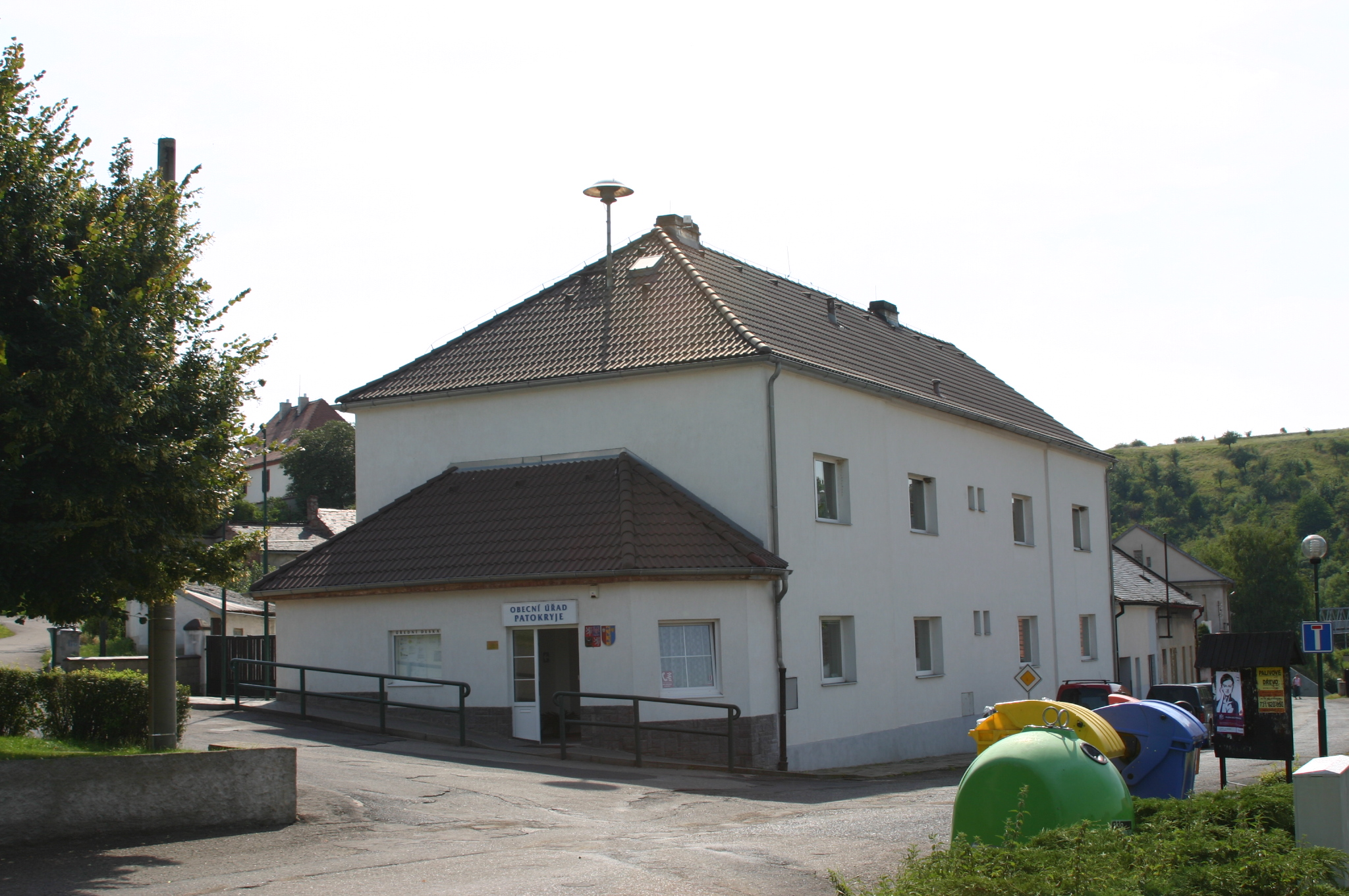 Obec Patokryje v okrese Most - obecní úřad na návsi. Vlevo na kopci tvrz.